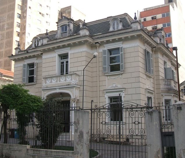 Fundação Escola de Sociologia e Política de São Paulo (FESPSP), na Vila Buarque, distrito da Consolação, São Paulo, Brasil.